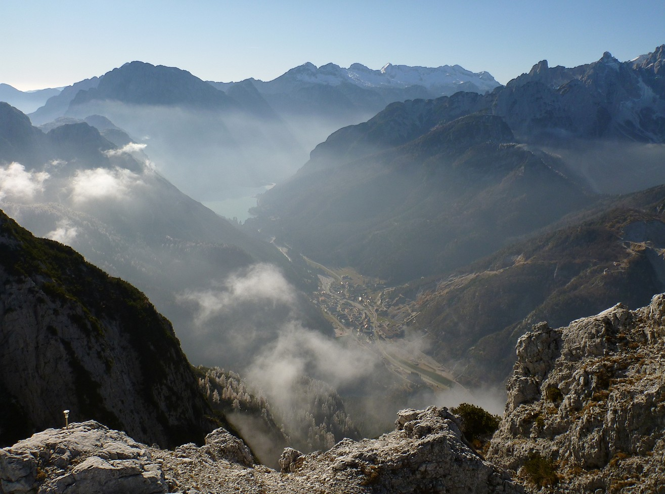 Verso il lago dalla prima punta